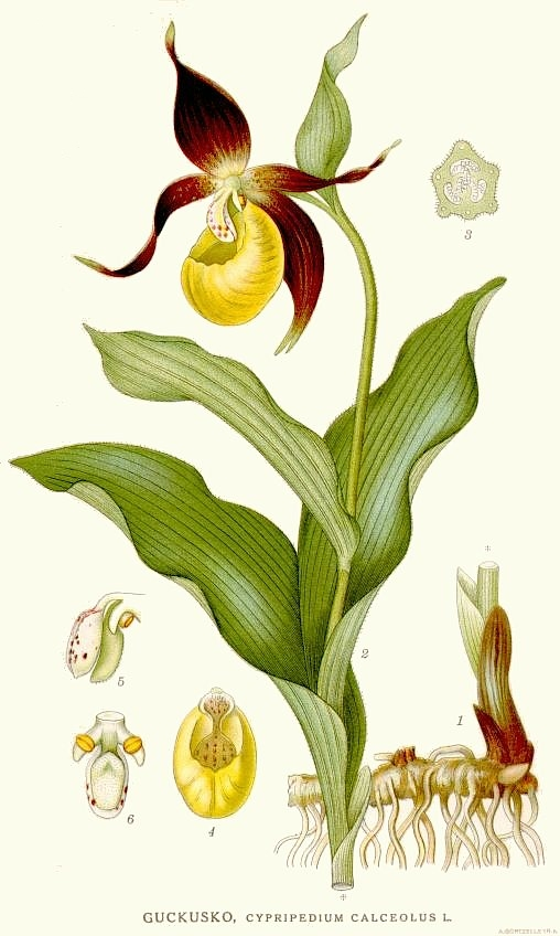 Original Description Guckusko, Cypripedium calceolus L.